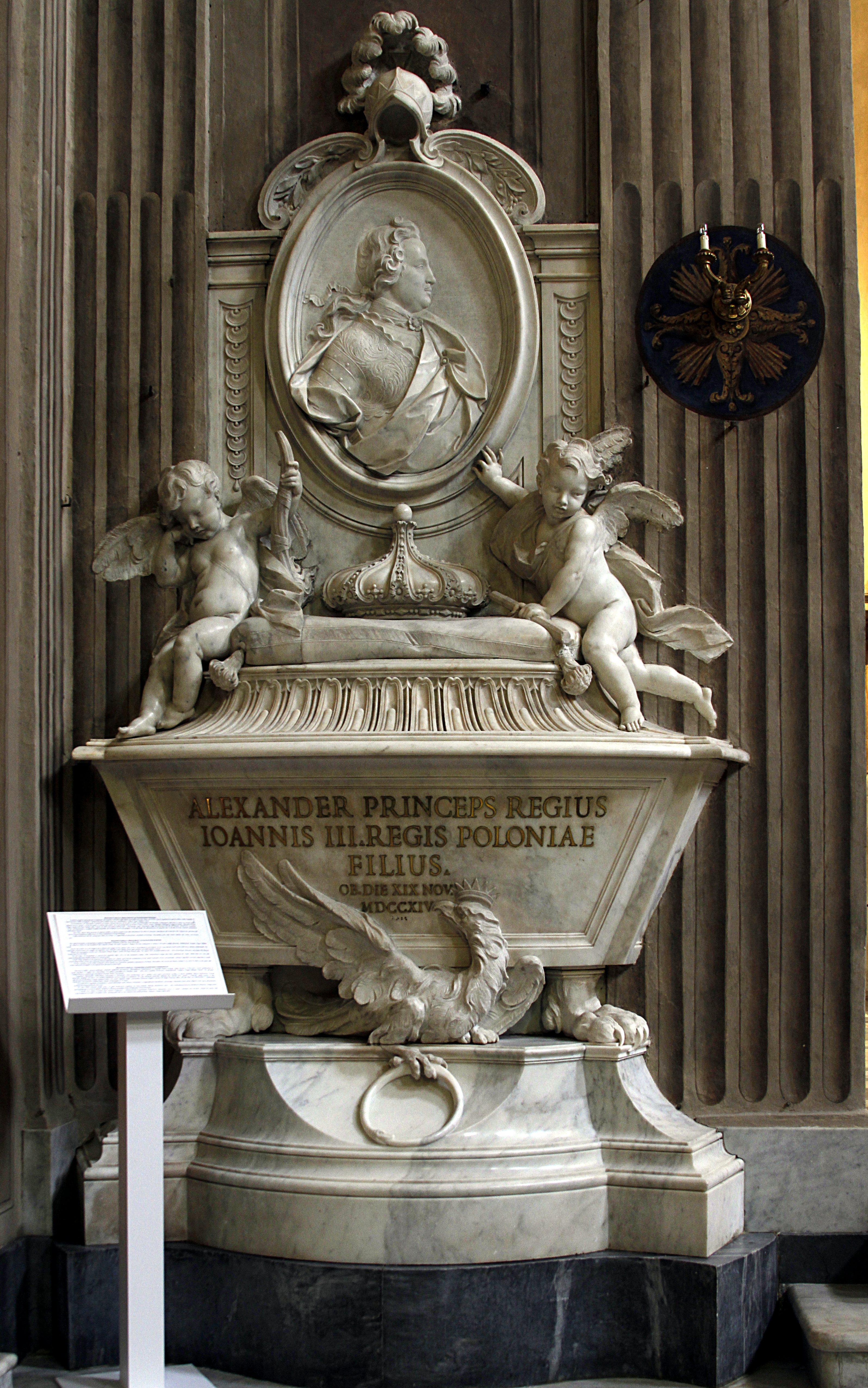 Santa Maria Immacolata a via Veneto - Rome